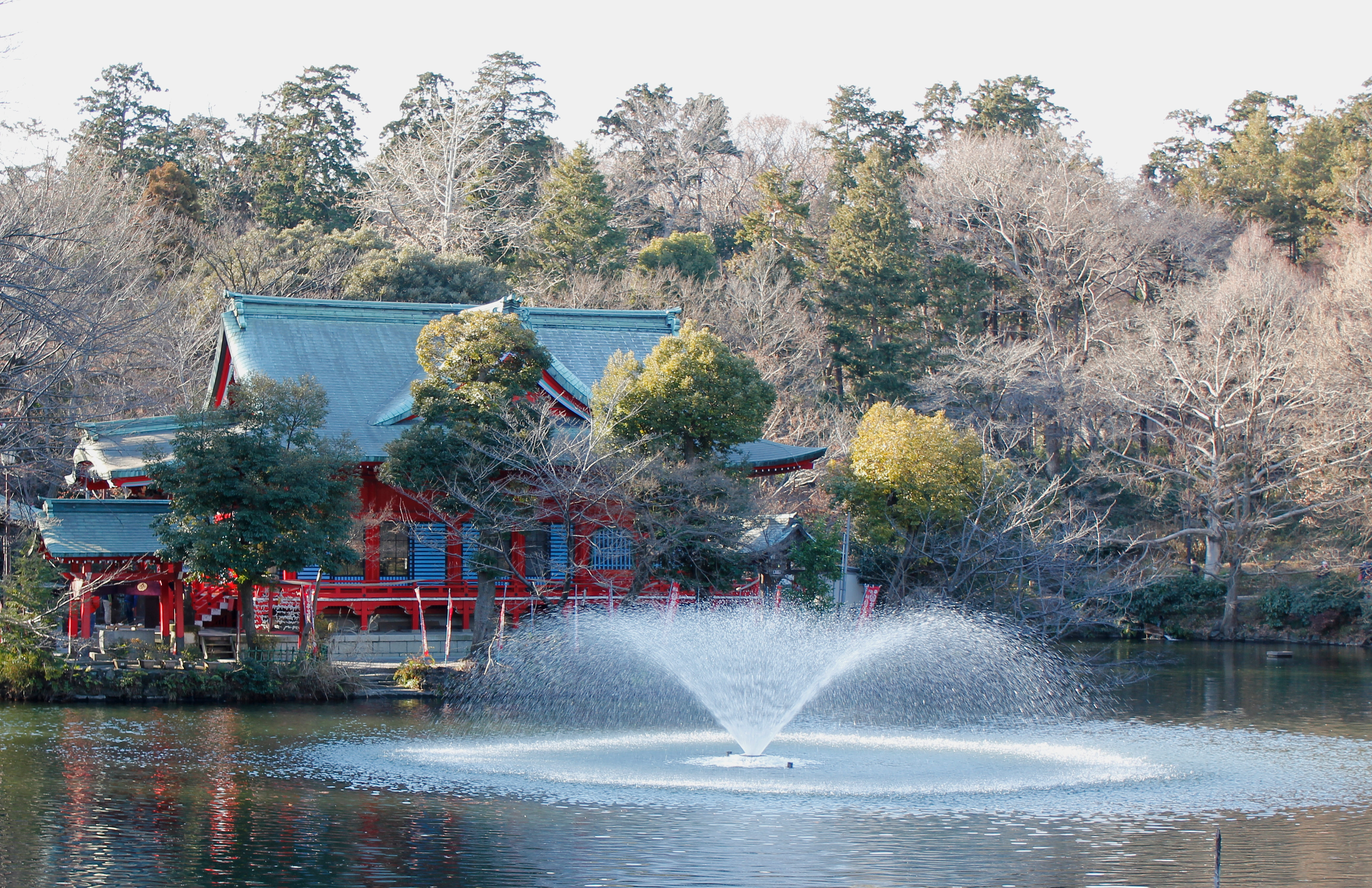 都立井の頭恩賜公園内に存在する井の頭弁財天（大盛寺）